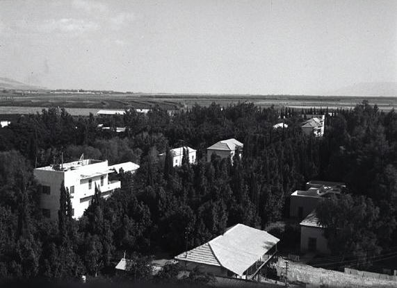 אשדות יעקב - מראה כללי